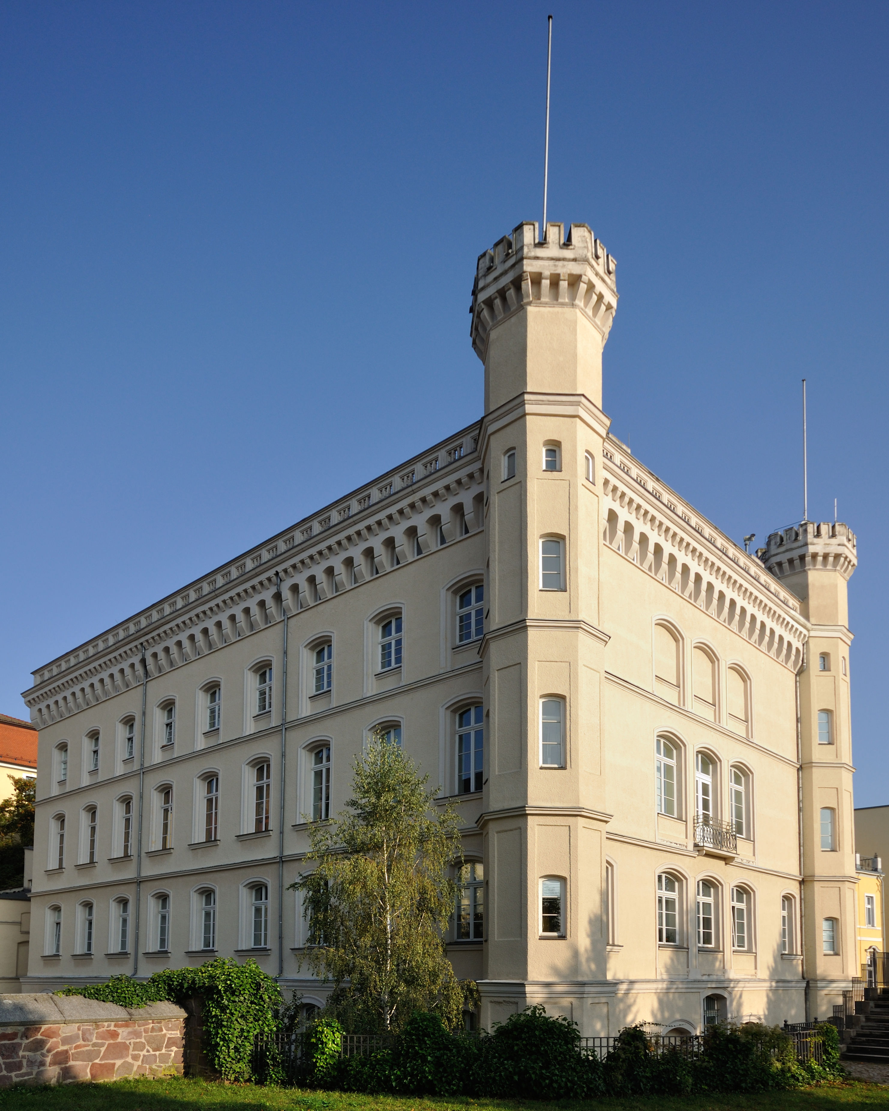 Verwaltungsgebäude Fürstenwallstraße 20 in Magdeburg-Altstadt, ehemaliges Oberpräsidialgebäude der Provinz Sachsen. This is a photograph of an architectural monument.It is on the list of cultural monuments of Magdeburg